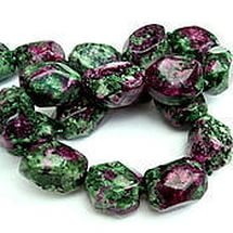 цоизит